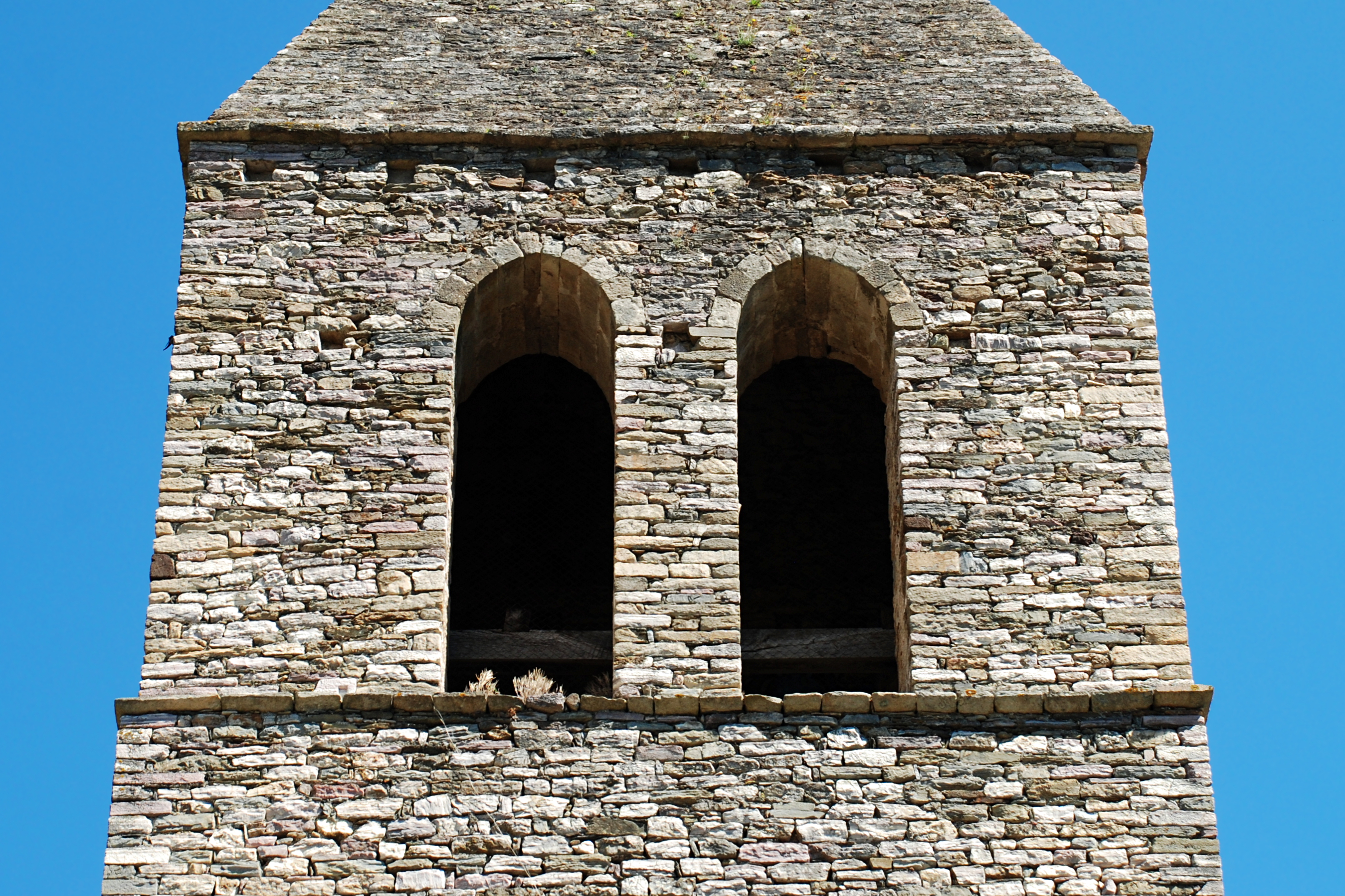 France - Languedoc - Hérault - Olargues - Église Saint-Laurent .